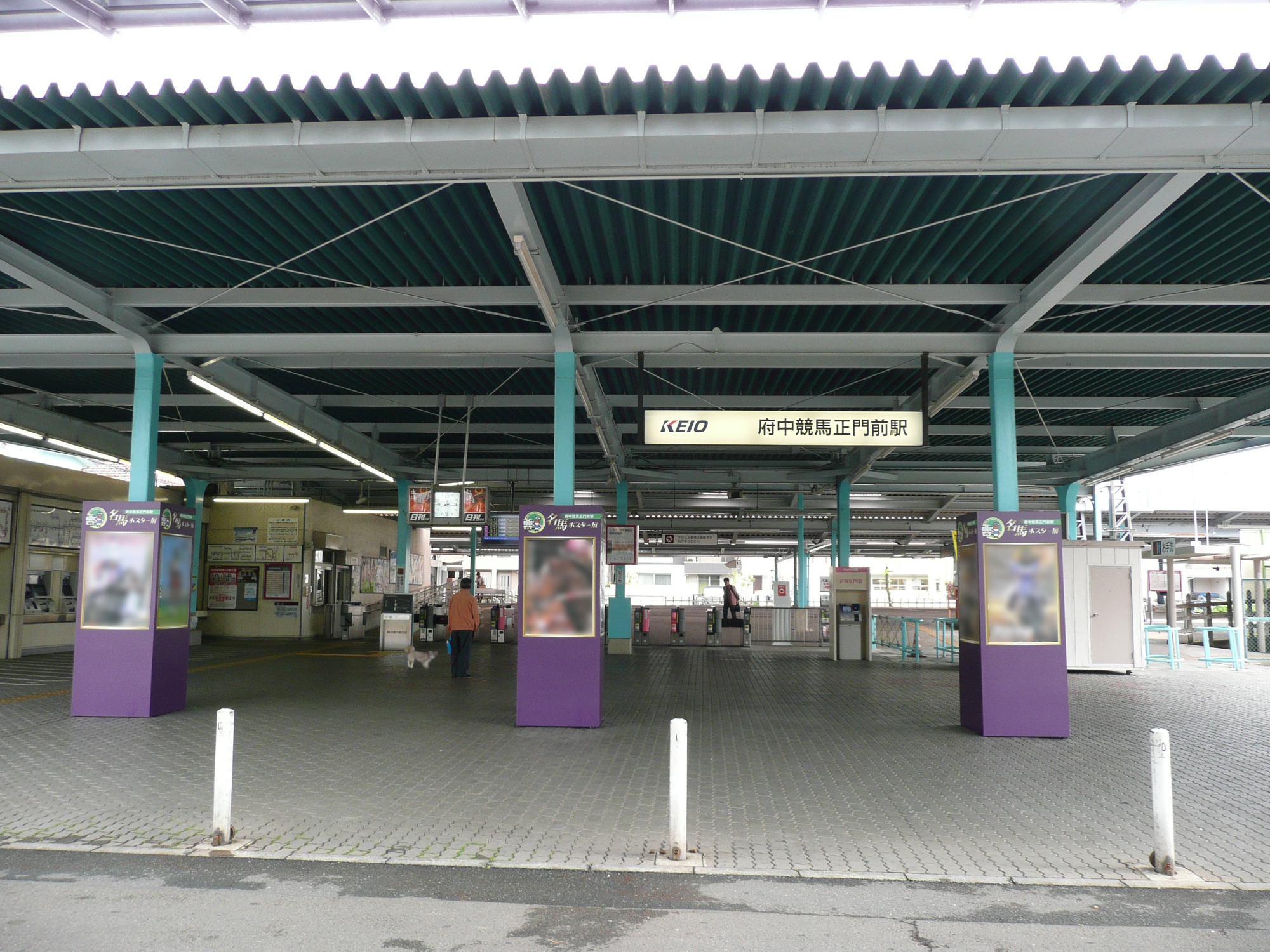 府中競馬正門前駅